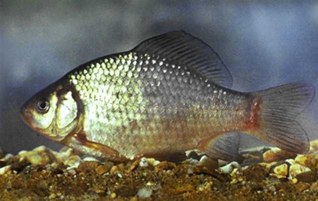 Carassius carassius